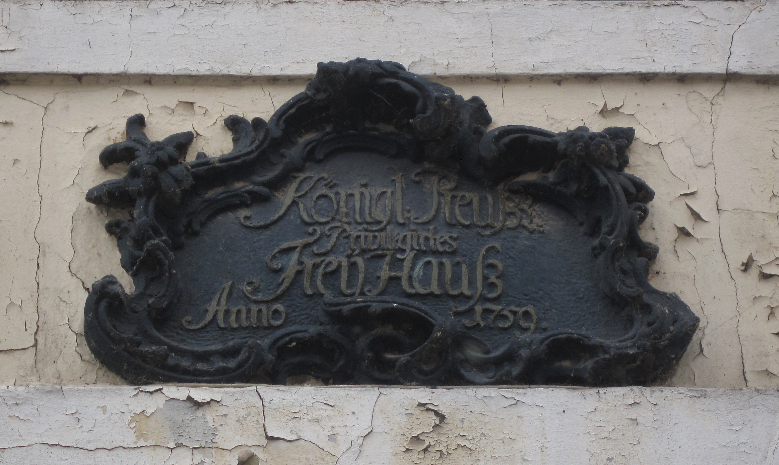 Relief über dem rechten Hauseingang des Wohnhauses Lange Straße 13 in Havelberg. Denkmal-ID 094 98202 000 000 000 000. Relief über dem rechten Hauseingang: Königl. Preuß. Privilegirtes Freÿ Hauß Anno 1759.